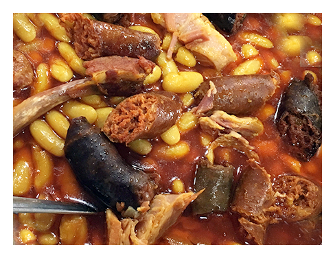 Fuente de fabada con compango